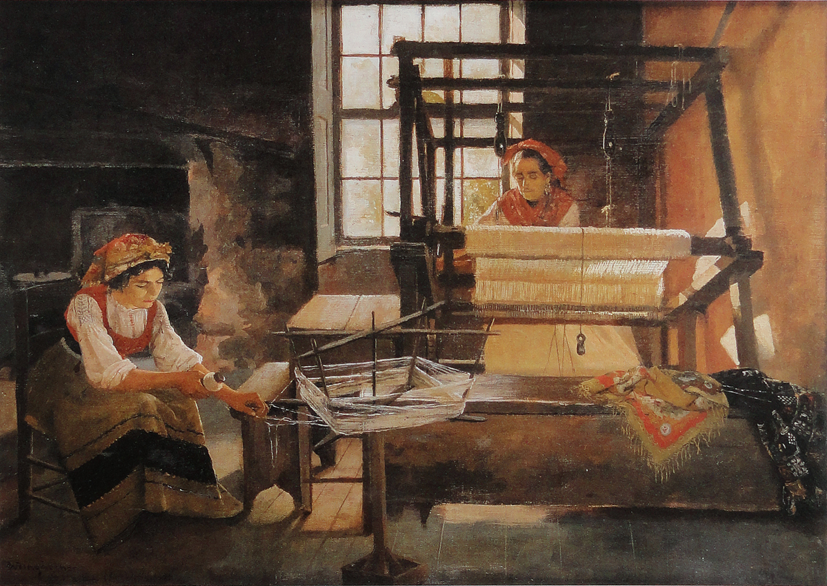 Tecelãs, óleo sobre tela, 27,5 x 37,5 cm, coleção particular